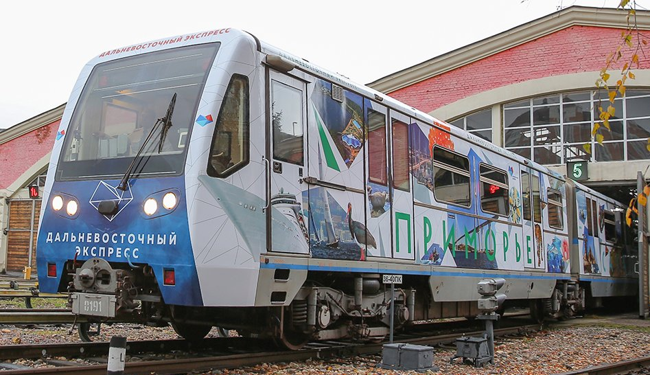 Именной электропоезд метро «Дальневосточный экспресс-2» типа 81-740/741 выезжает из депо «Красная Пресня» Московского метрополитена. Головной вагон 0191